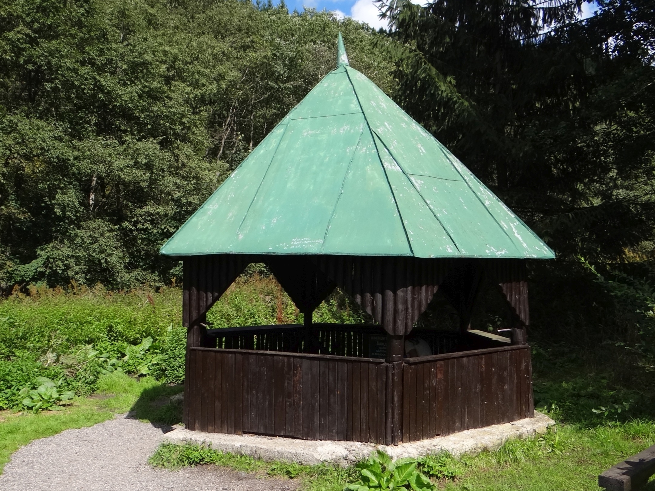 Jarabá, Brezno District